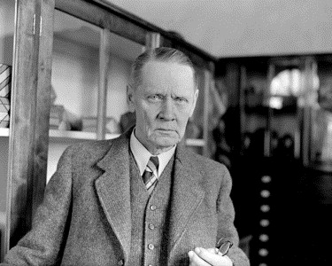 Пентти Эскола (1883 - 1964)